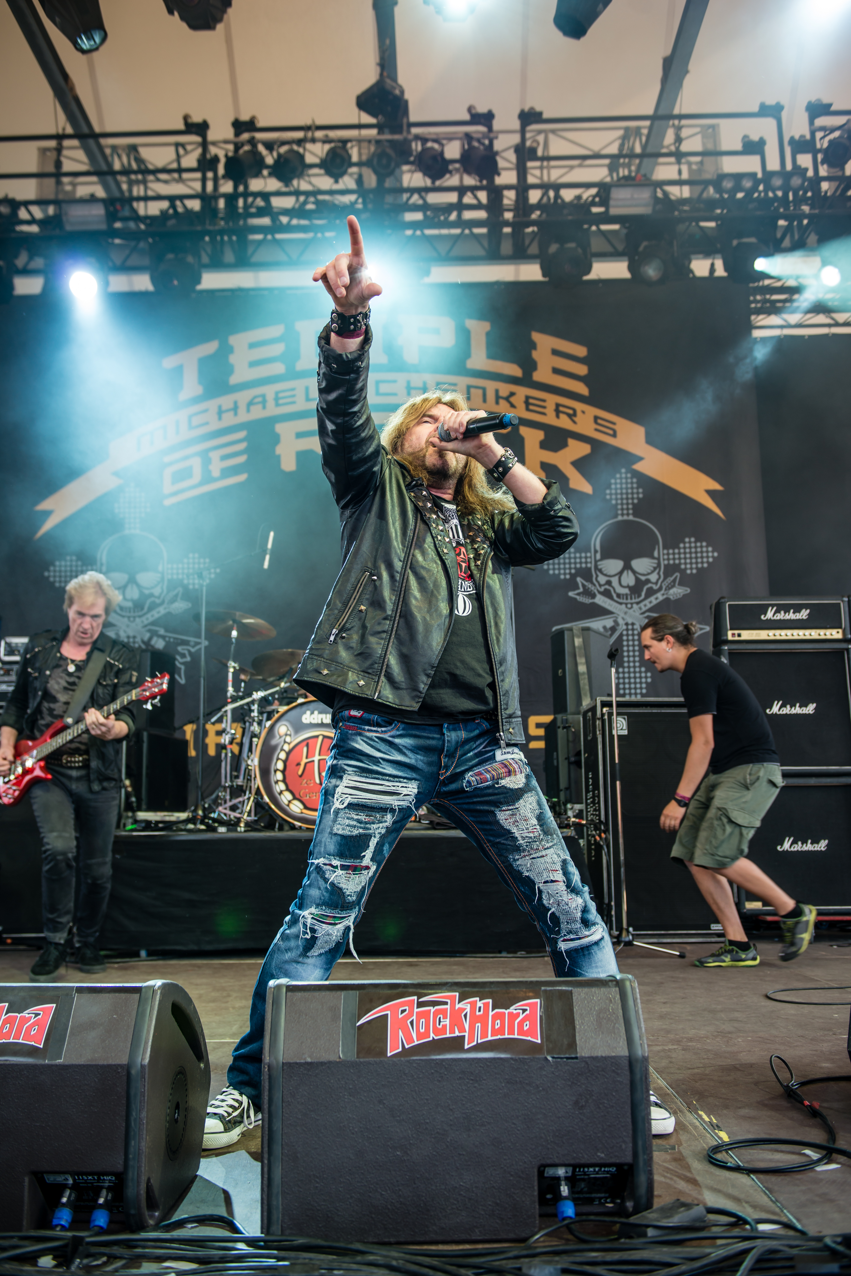 'Rock Hard Festival 2015; Gelsenkirchen Amphitheater': ' Michael Schenker's Temple of Rock'